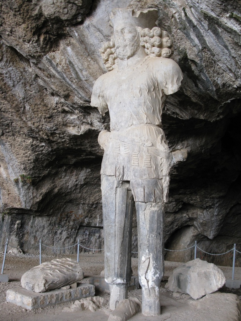 نقش برجسته44